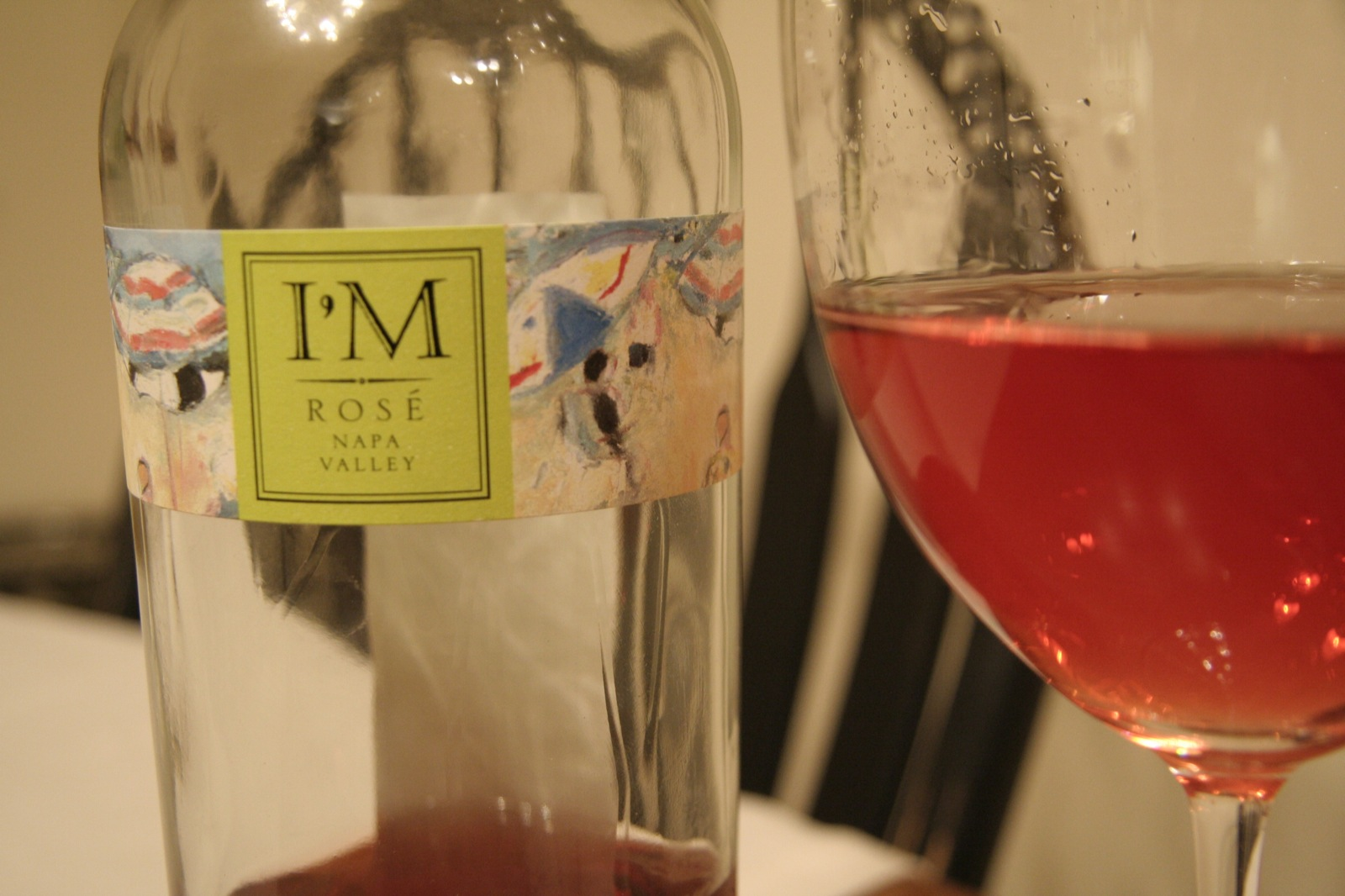 Rosé